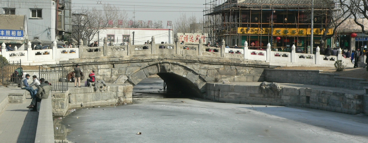 后门桥 用心阁于2005年3月5日拍摄于地安门外